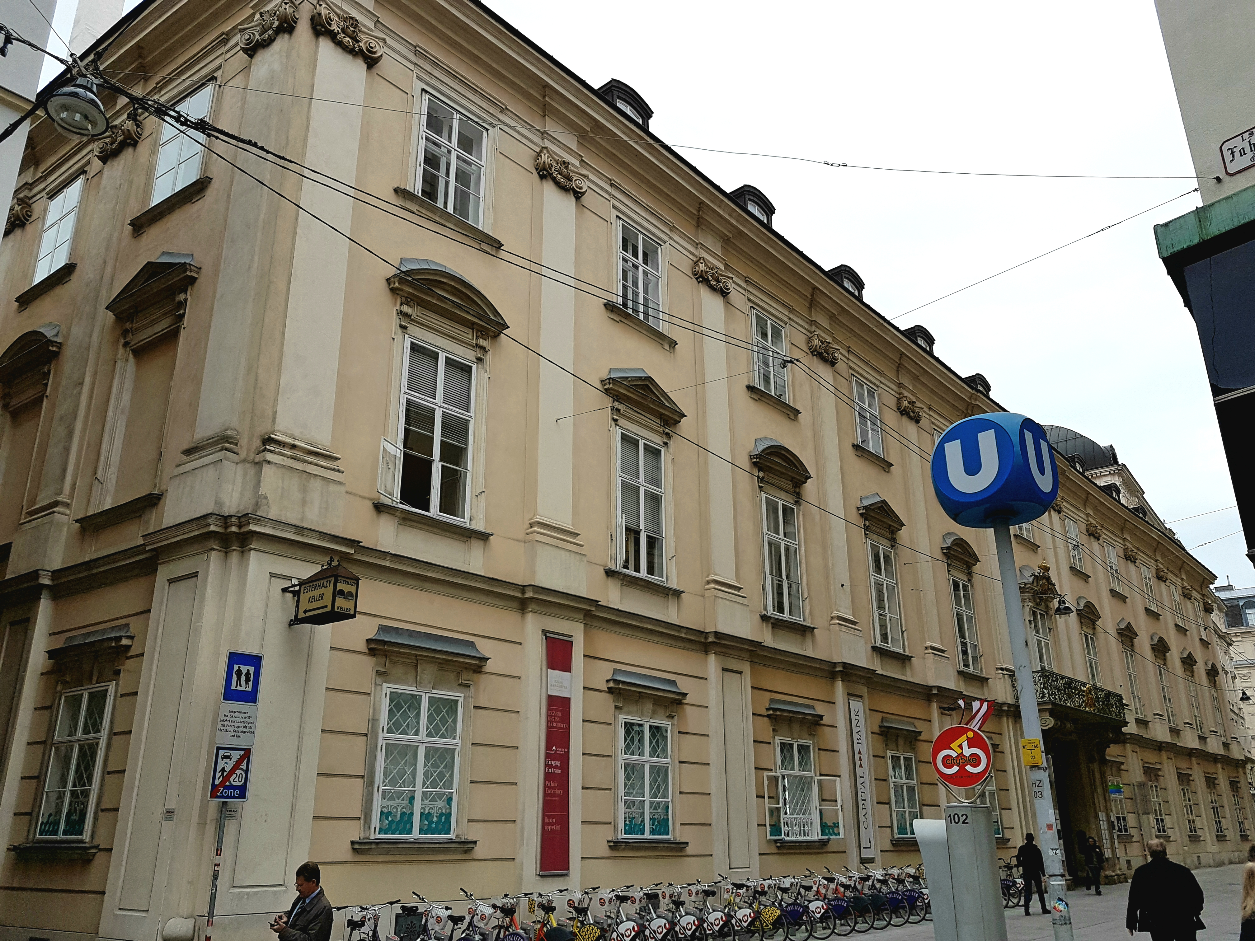 Wien-Innere Stadt, Wallnerstrasse 4, das Palais Esterhazy wurde 1687 durch Francesco Martinelli errichtet und erhielt durch den Umbau von 1745/46 seine noch heute bestehende barockklassizistische Fassade.